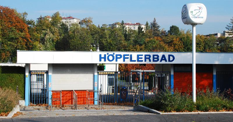 Der Eingang zum Höpflerbad der Stadt Wien in der Endresstraße im 23. Wiener Gemeindebezirk